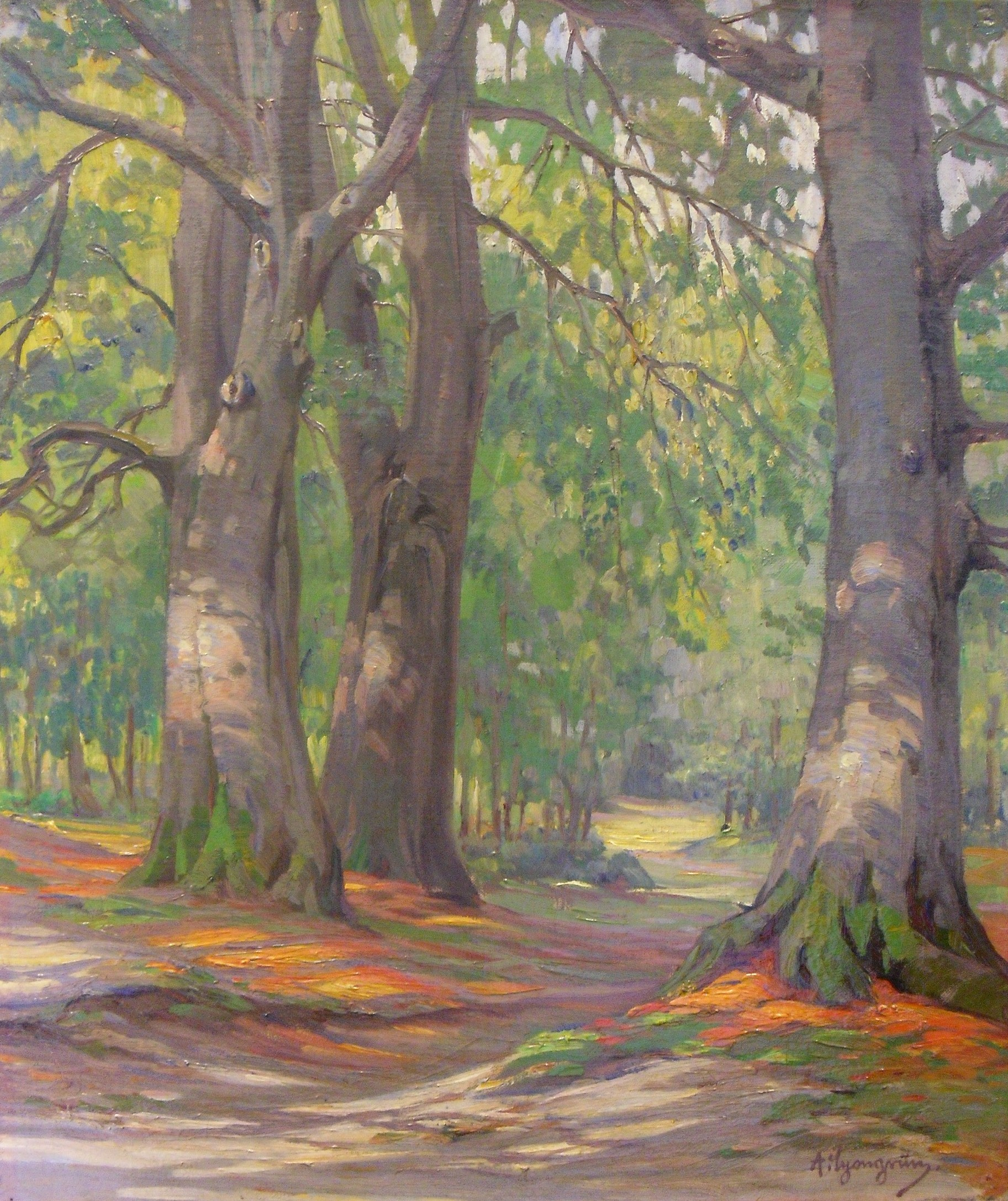 Herbstwald (in Privatbesitz)